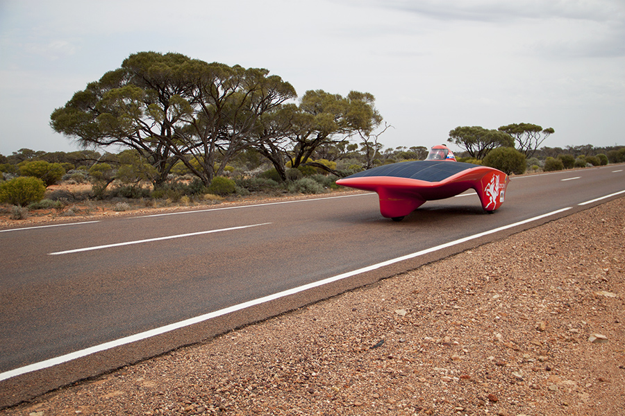 De 21Connect tijdens de World Solar Challenge 2011